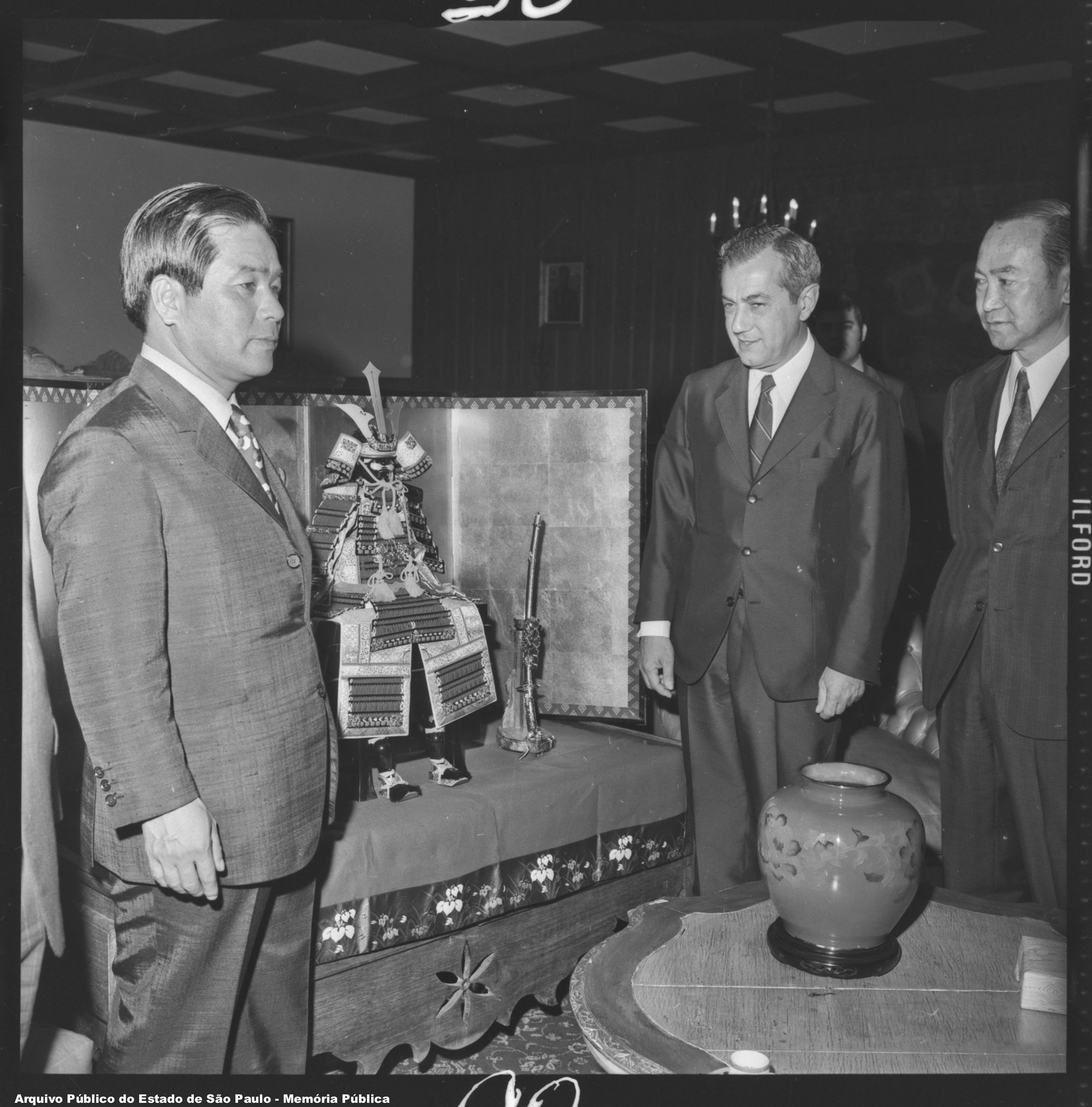 O presidente da Yakult Hisami Matsuzono (à esquerda) visita o governo governador do estado de São Paulo Laudo Natel. Imagem do acervo iconográfico do Arquivo Público do Estado de São Paulo, código:BR APESP SEGOV ICO NEG 3078 02